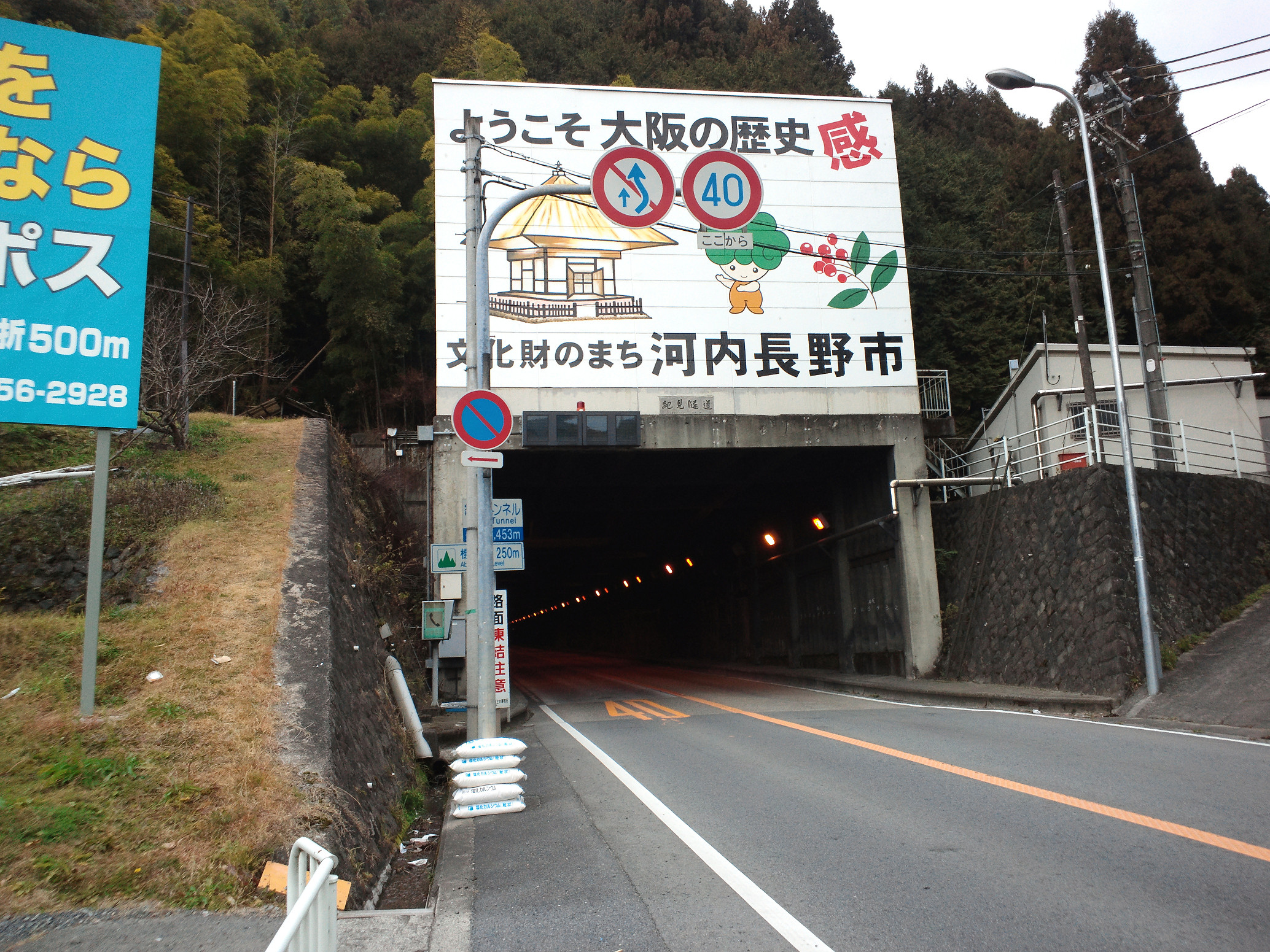 国道371号 紀見トンネル（和歌山県側）